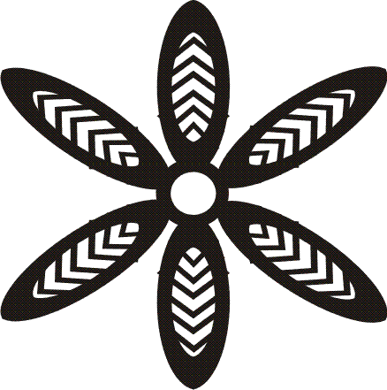 Goldstern-Hieroglyphe (Goldrosette)